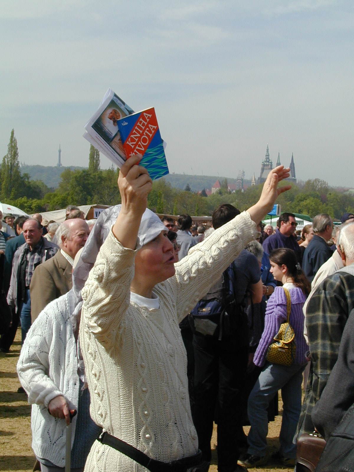 Žena s Knihou života a letákem s Aštarem Šeranem; Letná, květen 2002